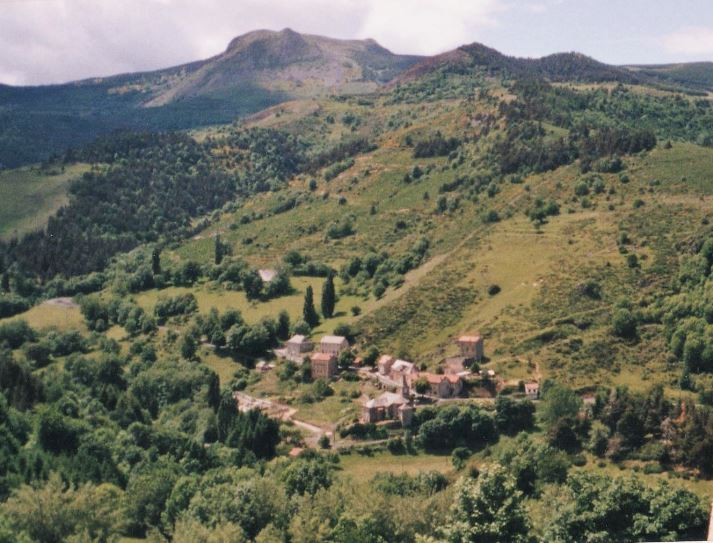 Village de La Rochette (Ardèche) dans les années 1980.